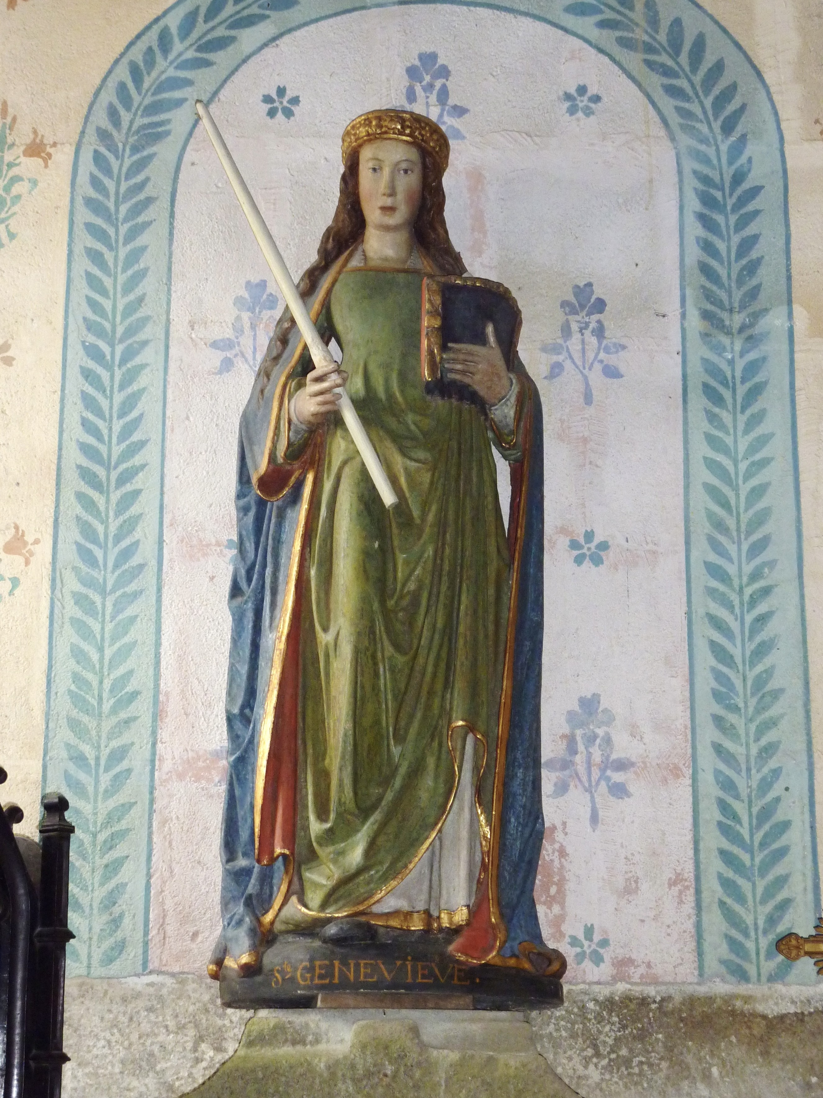 Loqueffret: Eglise Sainte-Geneviève, statue de sainte Geneviève